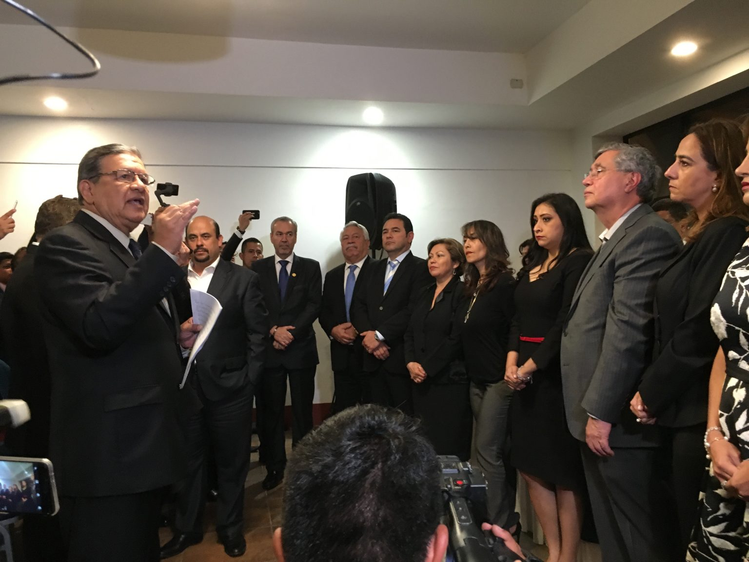 La bancada Guatemala es juramentada en el Parlacen. Entre ellos, Jimmy y Jafeth.